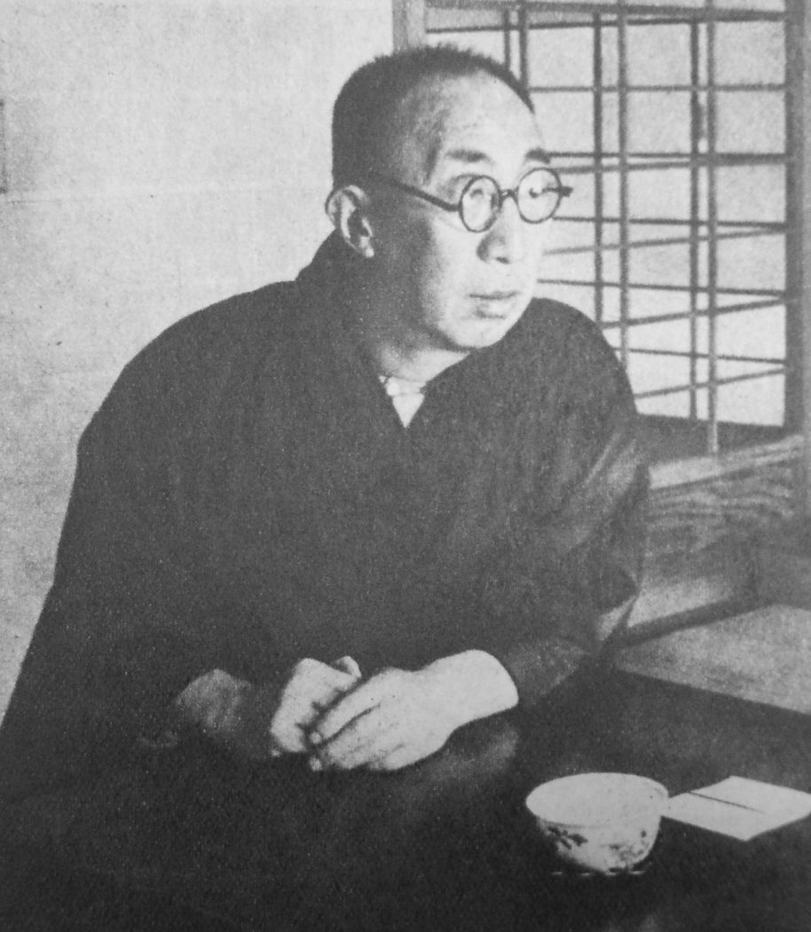 九条道秀（九条家第33代当主）